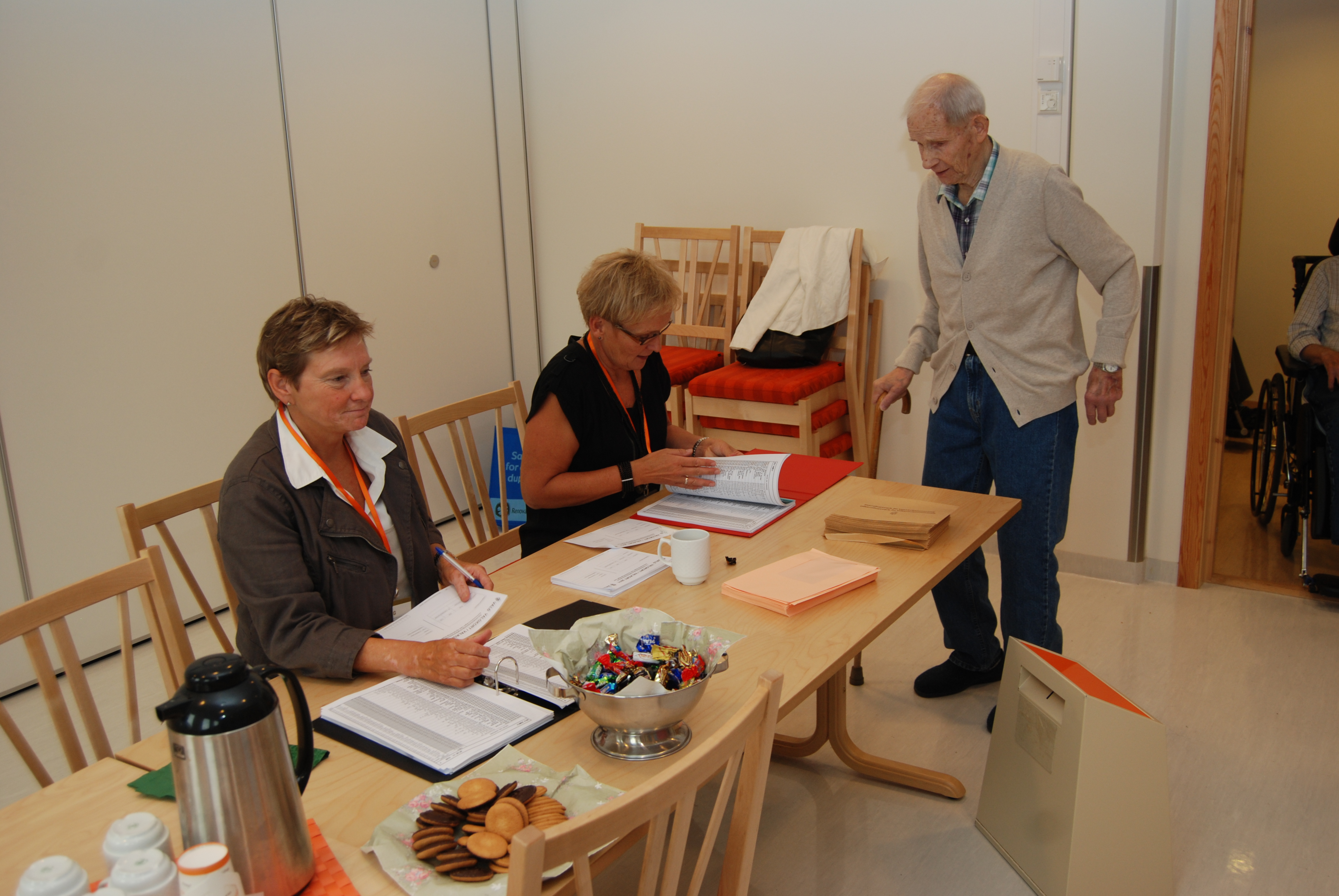 Forhåndsstemming ved Bamble sykehjem i forbindelse med kommunestyre- og fylkestingsvalget 2011.